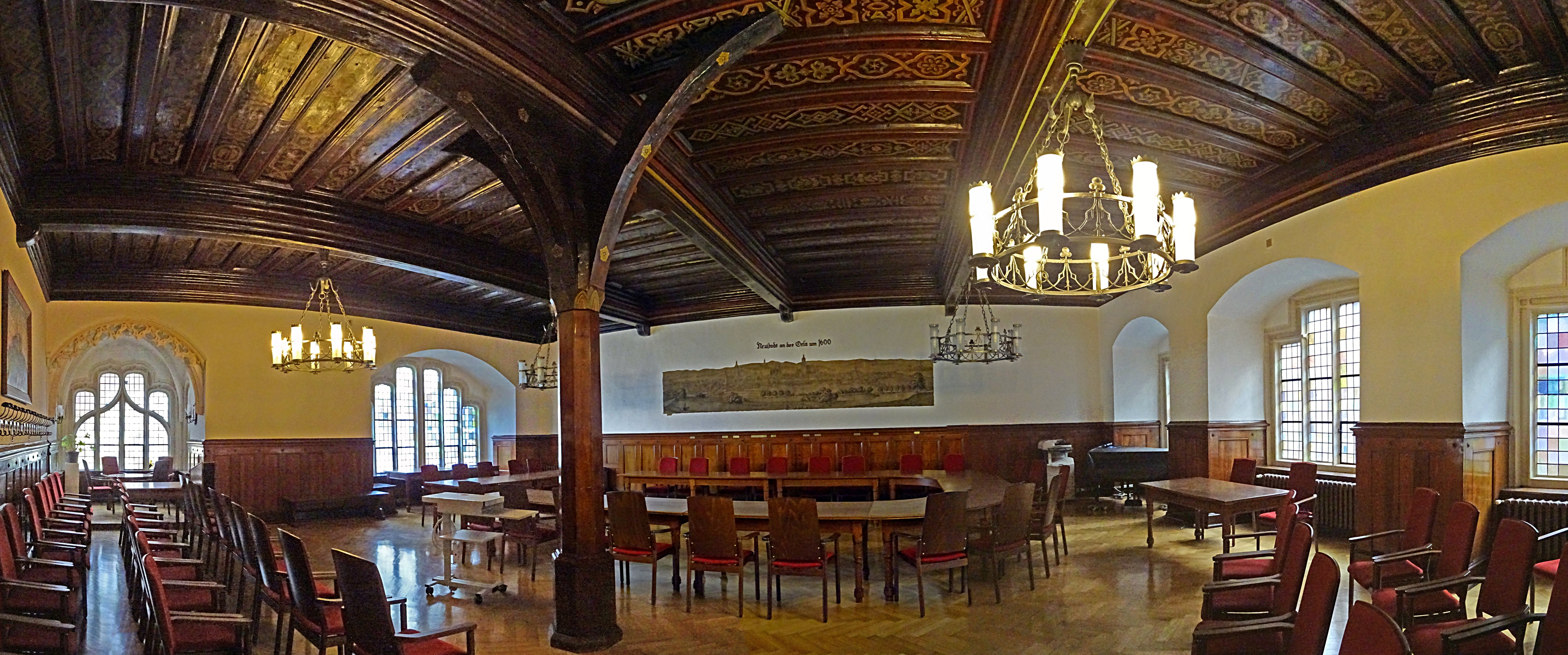 Festsaal im Rathaus Neustadt an der Orla